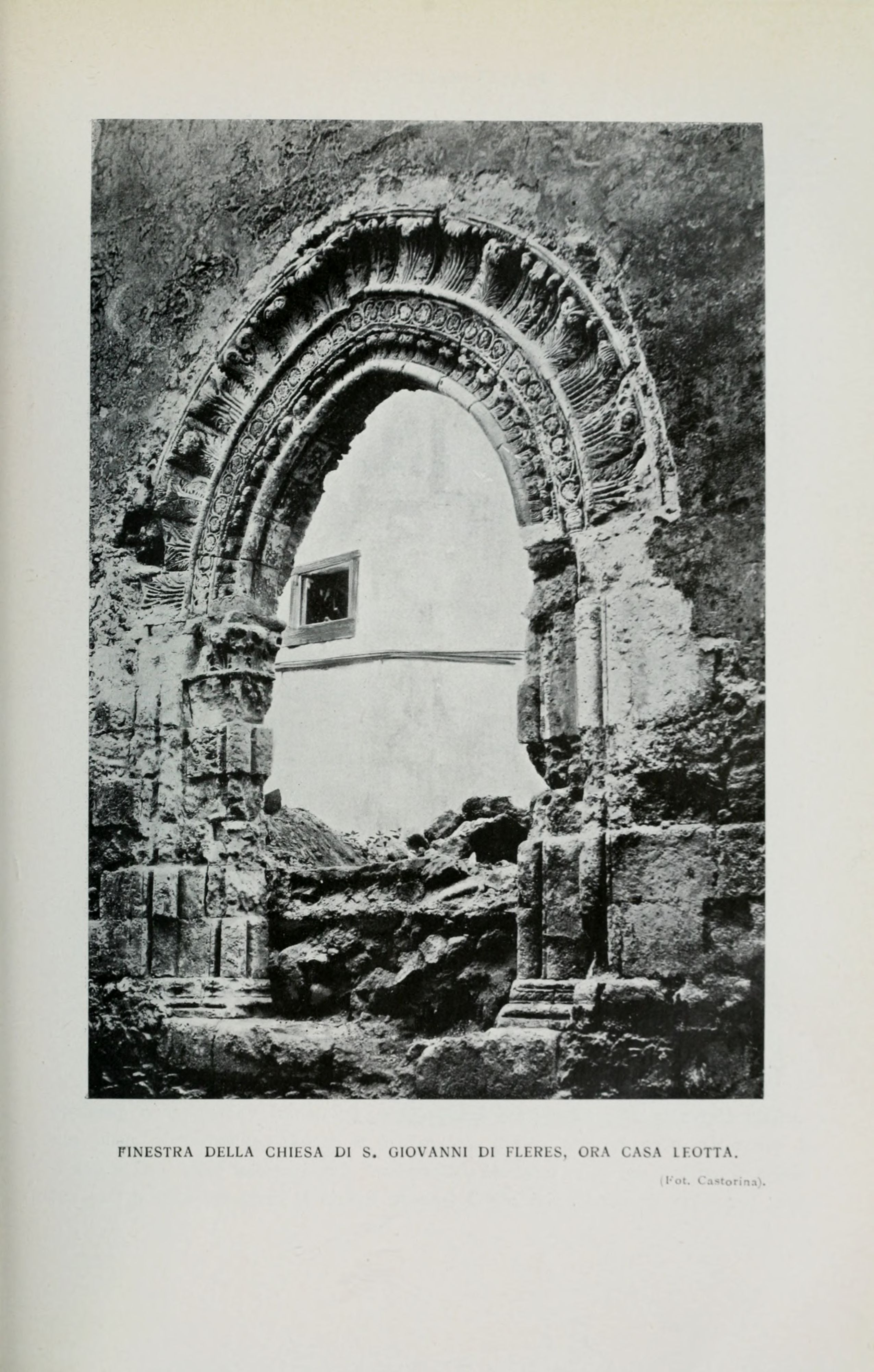 Buch:CATANIA - mit 152 Bildern von Federico De Roberto